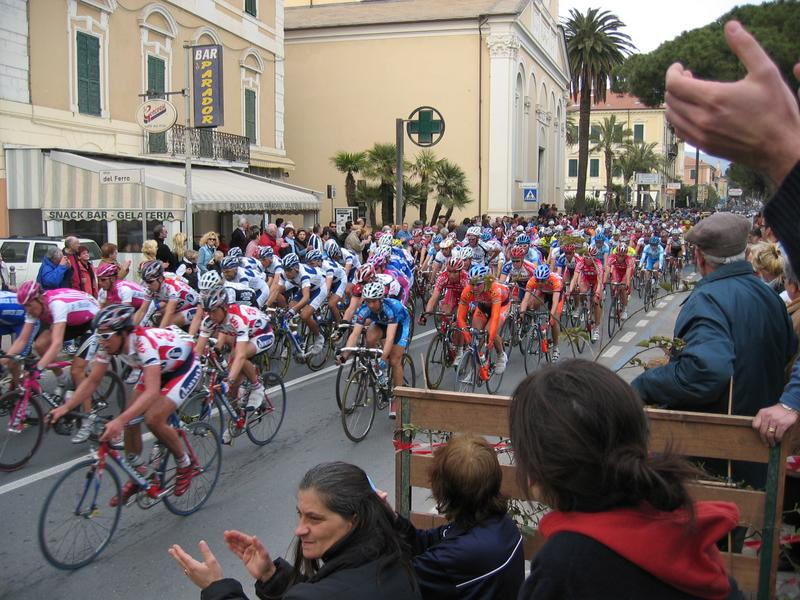 Beschreibung: Durchfahrt des Hauptfeldes beim Radrennen Mailand-San Remo 2004 in Diane Marina (Italien) Quelle: fotografiert am 20. März 2004 Fotograf: Nikolai Schwerg